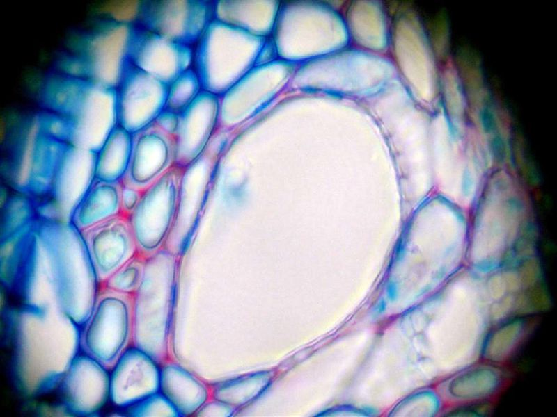 Transporte de água.